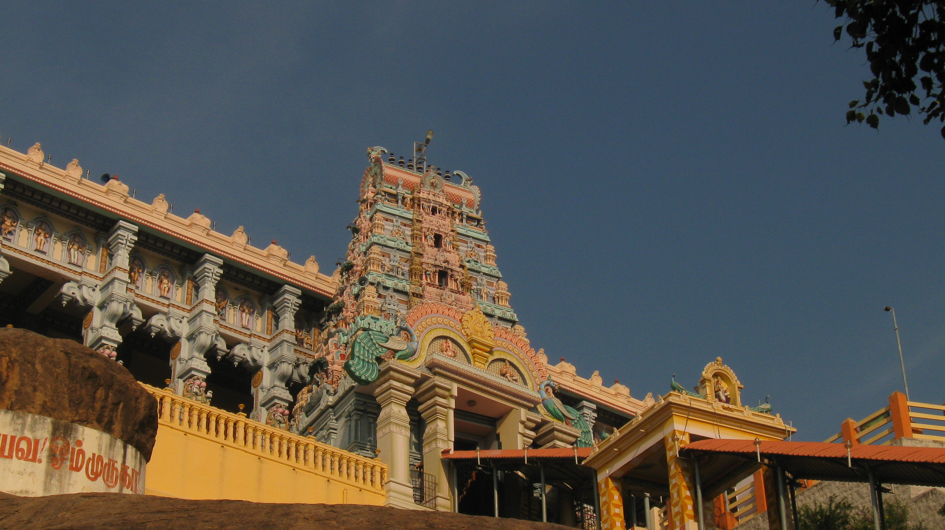 வரலாற்றுப் புகழ் பெற்ற முருகன் திருத்தலமான இரத்தினகிரி கோயிலின் அழகிய தோற்றம்.